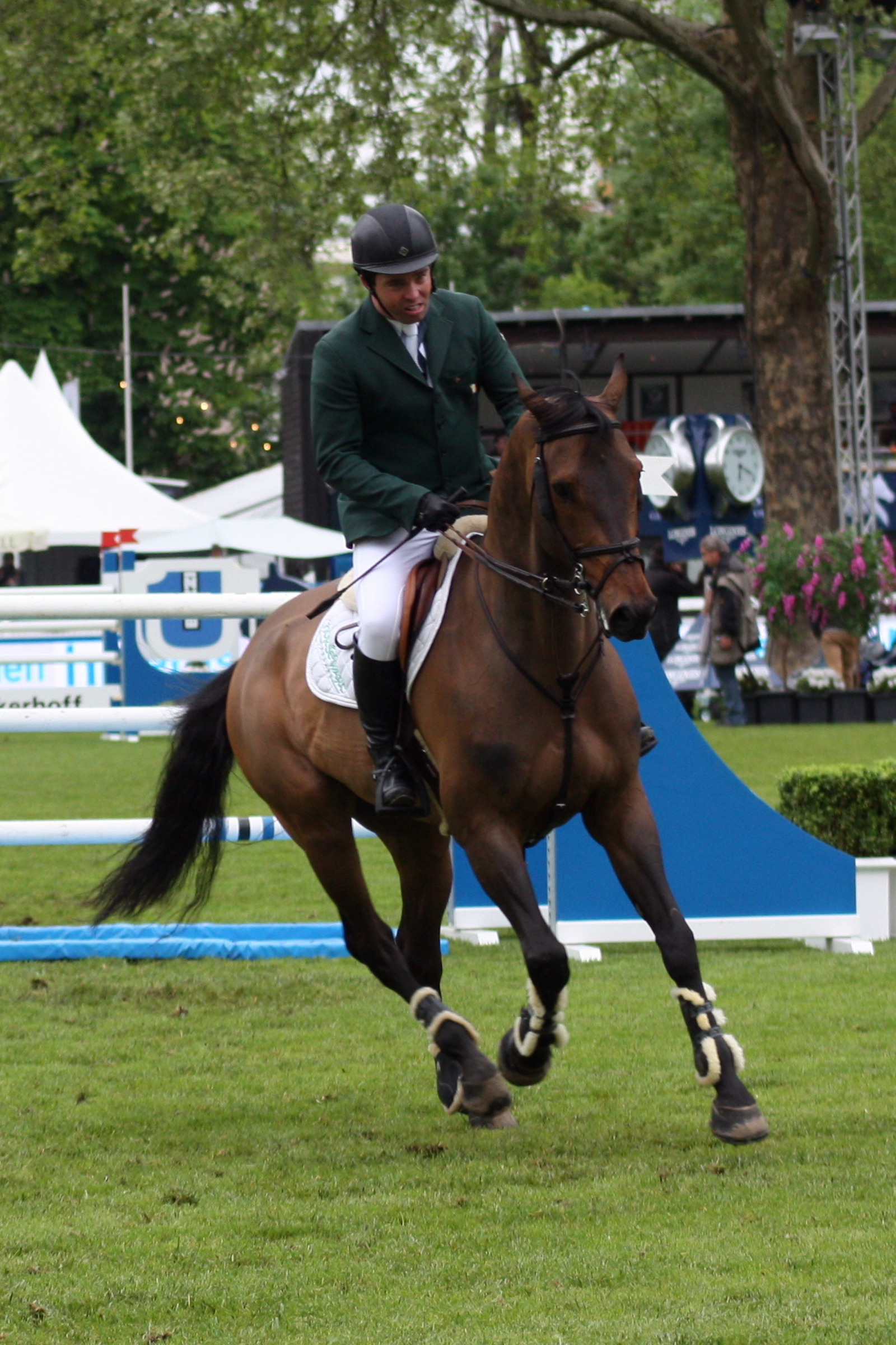 77. Internationanles Wiesbadener Pfingstunier 2013, CSI***** Eröffnungsspringen, Cian O'Connor auf Billy Cooper Personality rights warning Although this work is freely licensed or in the public domain, the person(s) shown may have rights that legally restrict certain re-uses unless those depicted consent to such uses. In these cases, a model release or other evidence of consent could protect you from infringement claims.